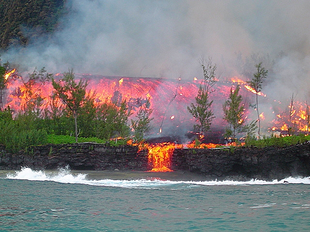 Contact entre la lave et l'océan. Une éruption du Piton de la fournaise. Photo prise le 26 février 2005